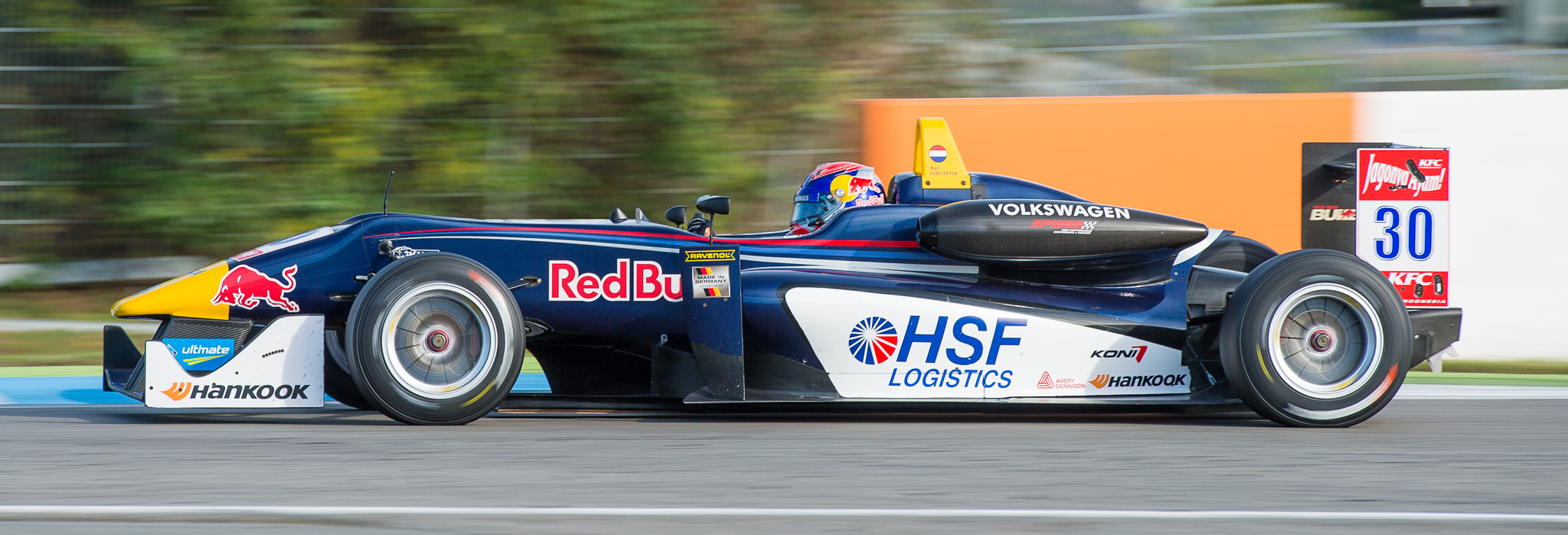 DTM,Dallara F312,Deutsche Tourenwagen Masters,F3 FIA European Championship,FIA Formel 3 Europameisterschaft,Hockenheimring,Max Verstappen,Motorsport,Van Amersfoort Racing,Volkswagen